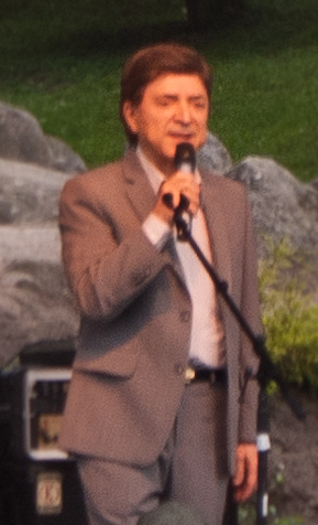 Jerzy Połomski występujący 23 lipca 2011 podczas Dni Iwonicza w Iwoniczu-Zdroju – powiększenie.